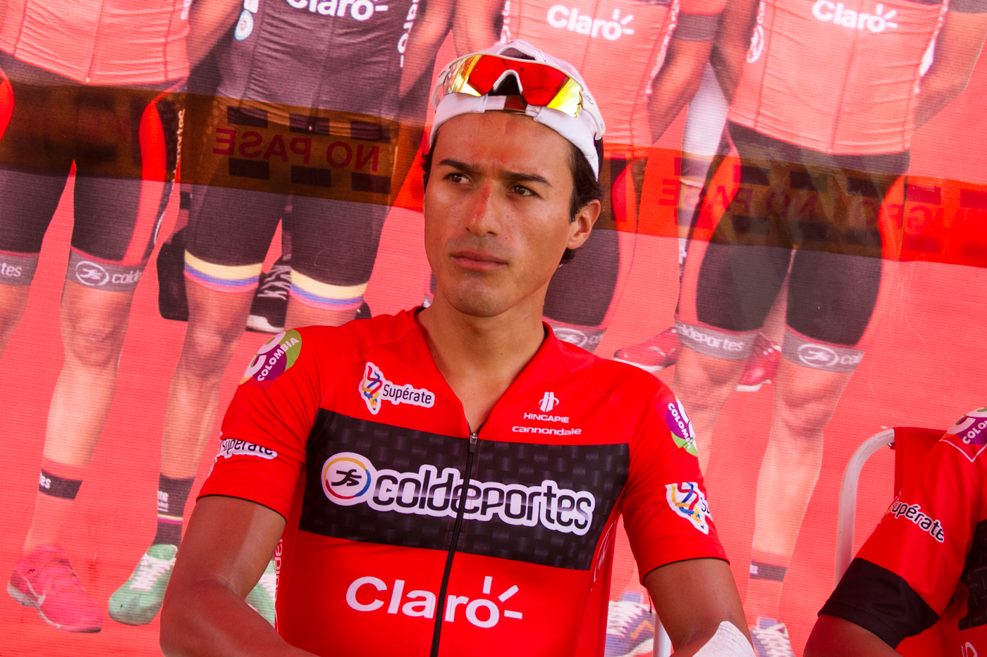 10ª Eta. Clásico RCN "Claro" 2013 Domingo 6 de octubre de 2013 CRI en Buenaventura (18Km) Foto: Coldeportes Claro (Lina Lopera)